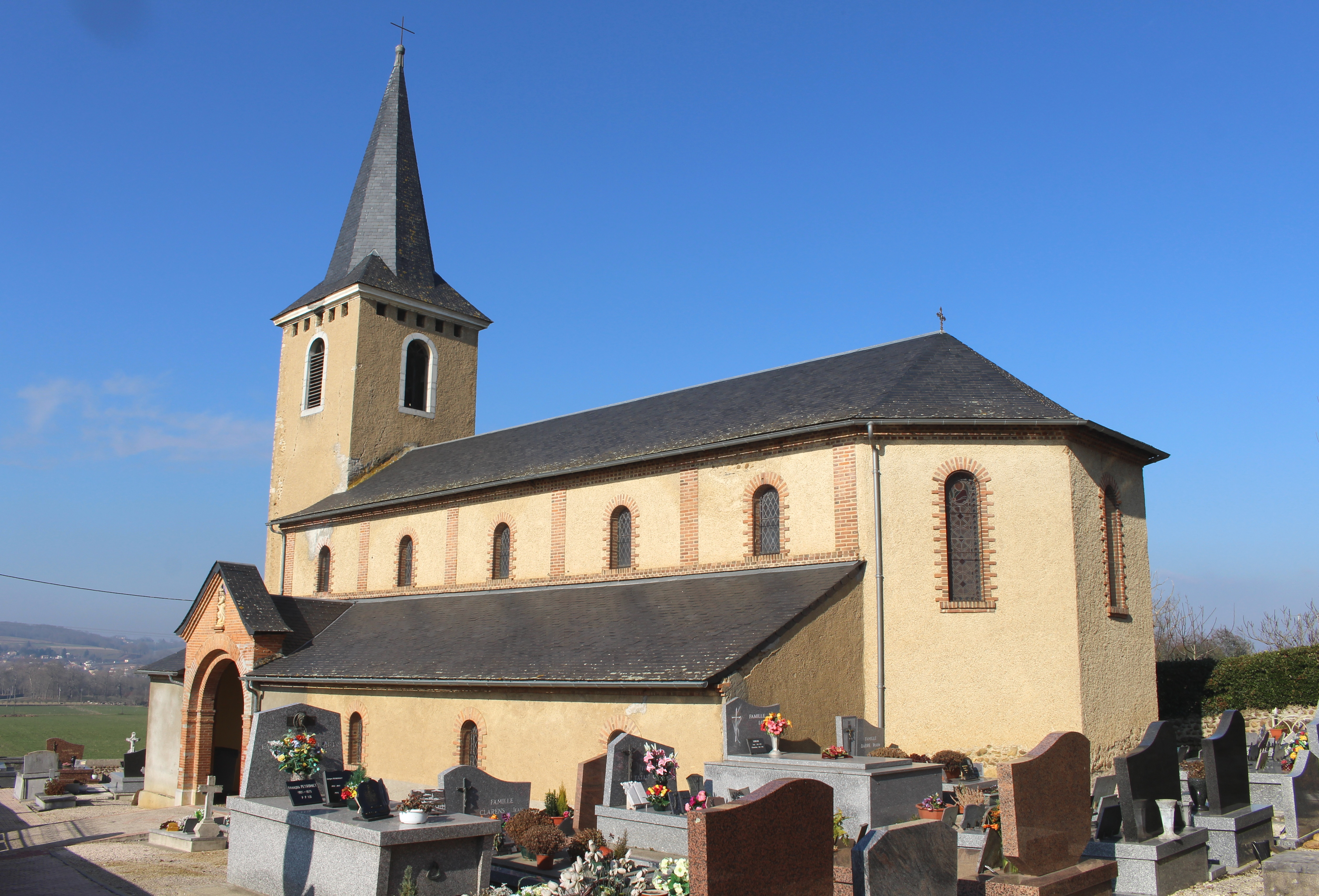 Église Saints-Adbdon-et-Sennen de Peyraube (Hautes-Pyrénées)